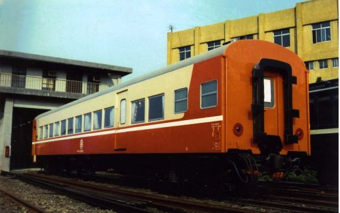 臺灣鐵路管理局觀光號客車35SP32820，如今已改造成總統花車35SA32820。攝影於臺灣鐵路管理局臺北檢車段。